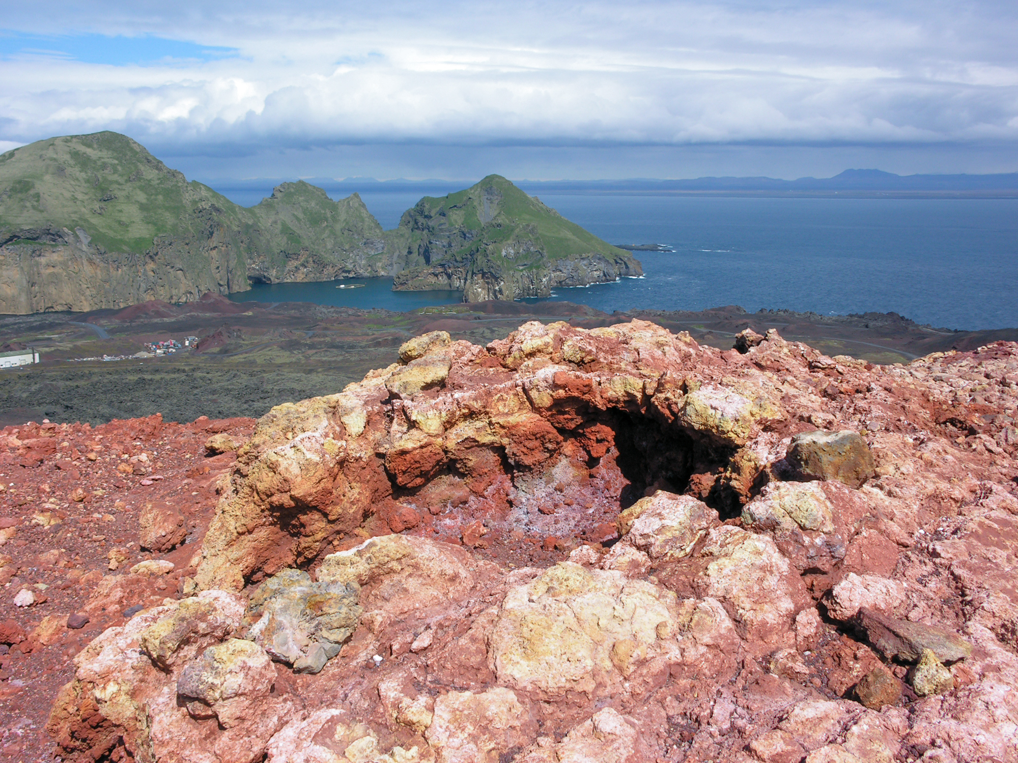 Vestmannaeyjar, Iceland